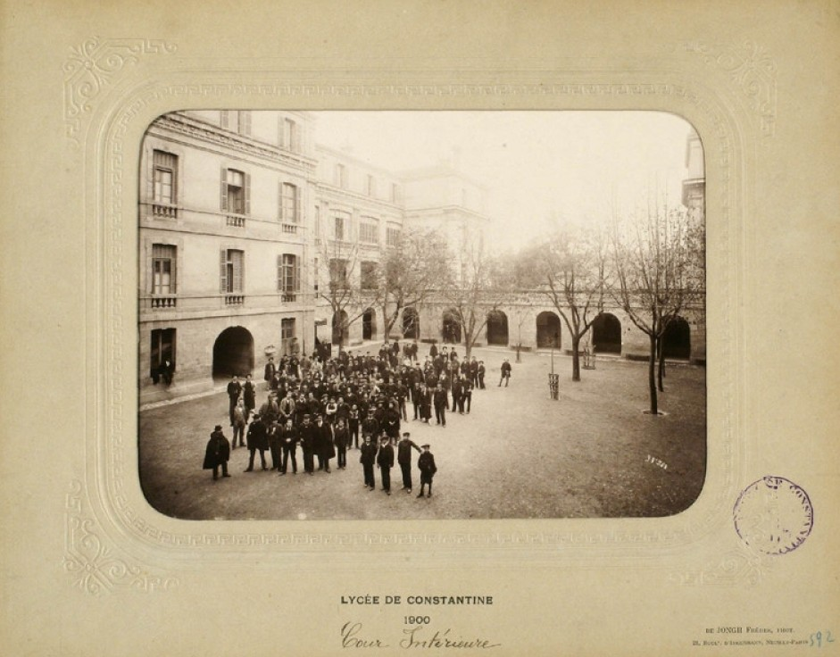 Lycée de Constantine (Algérie), la cour de récréation en 1900. Photographie des frères De Jongh, Neuilly-sur-Seine